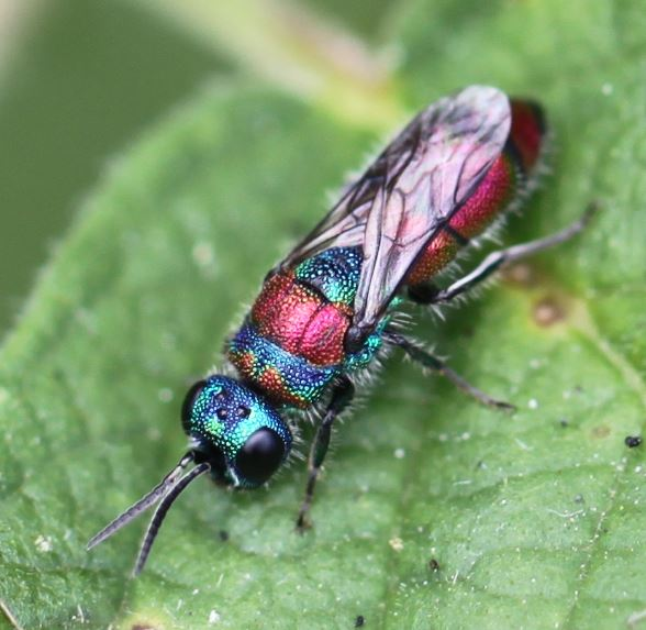 Goldwespe, wahrscheinlich Chrysis bicolor oder Chrysis illigeri, am 26. Juni 2018 in der Schwetzinger Hardt